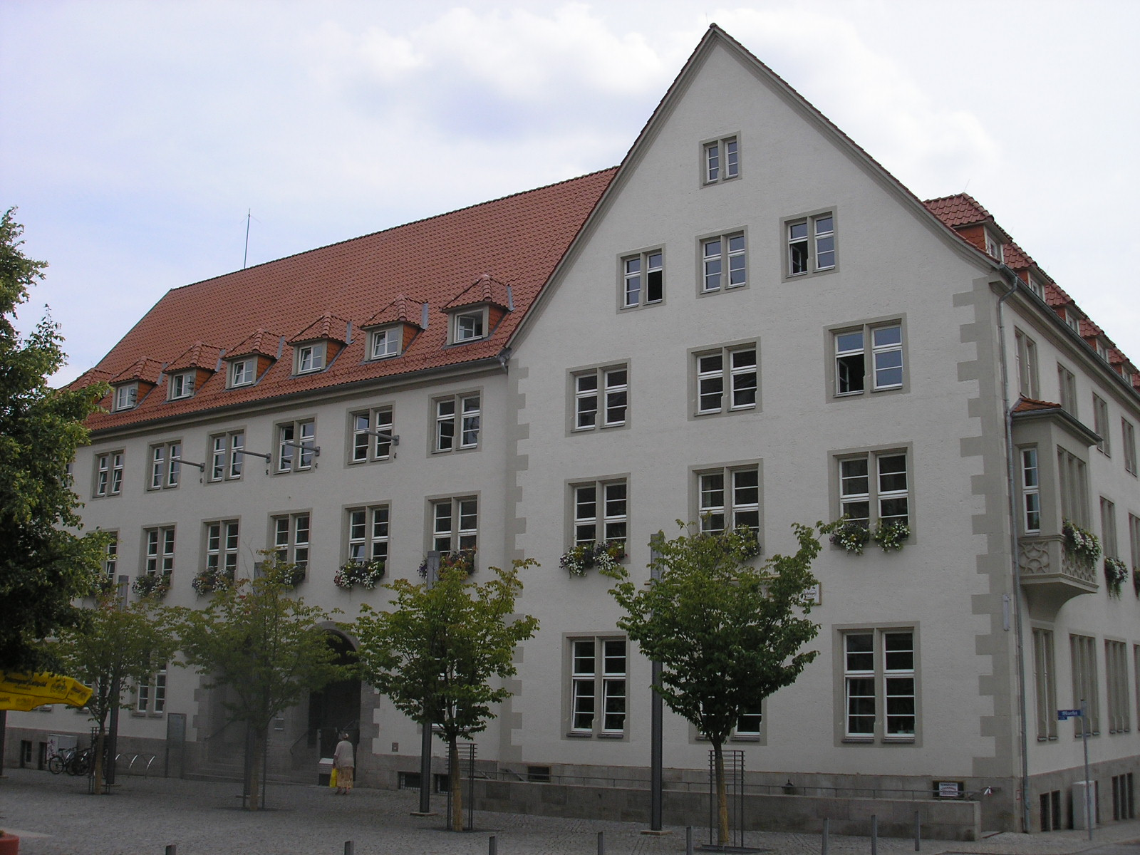 Das Neue Rathaus von Nordhausen (Thüringen).